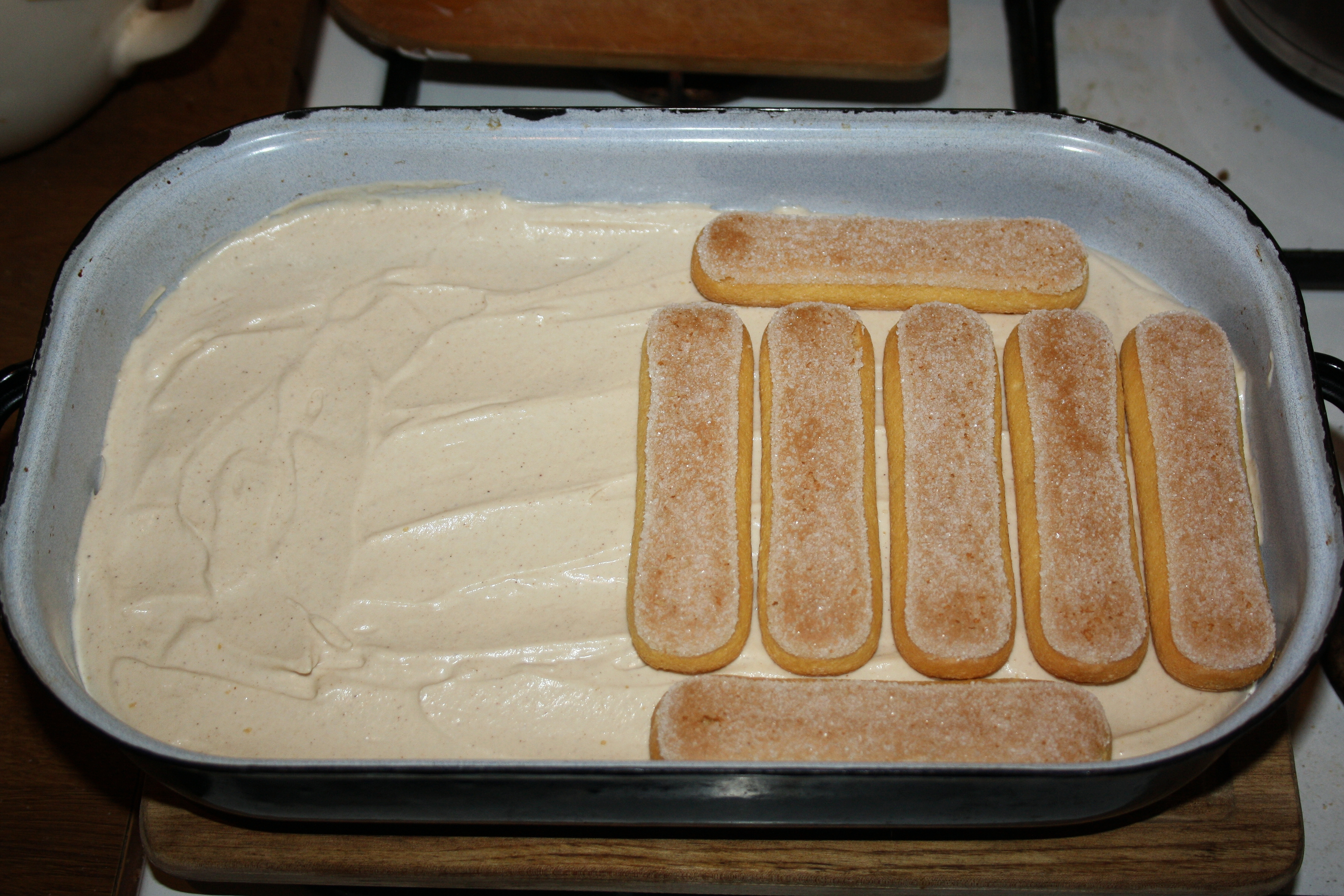 Tvarohové tiramisu - kladení druhé vrstvy piškotů